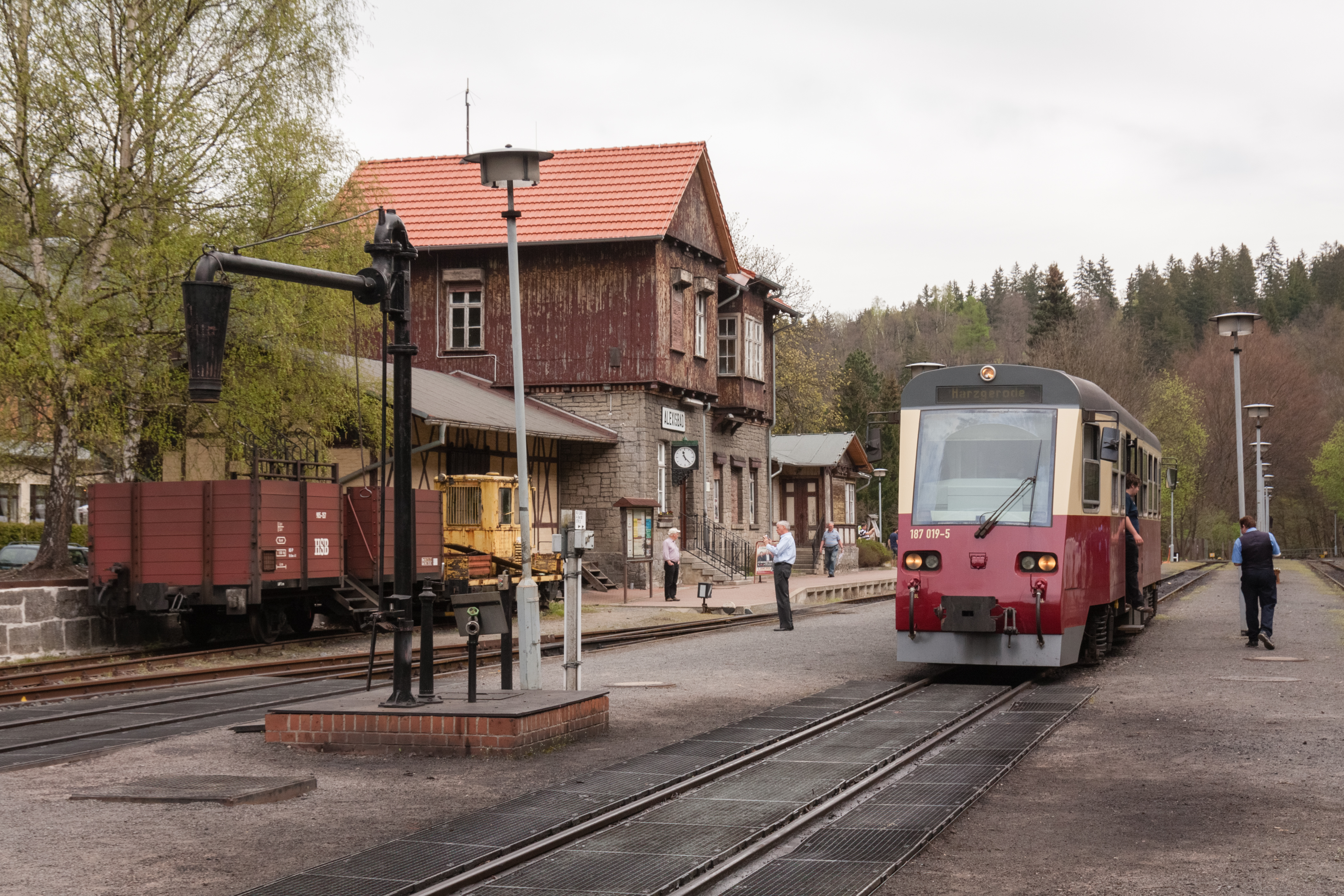 Triebwagen in Alexisbad